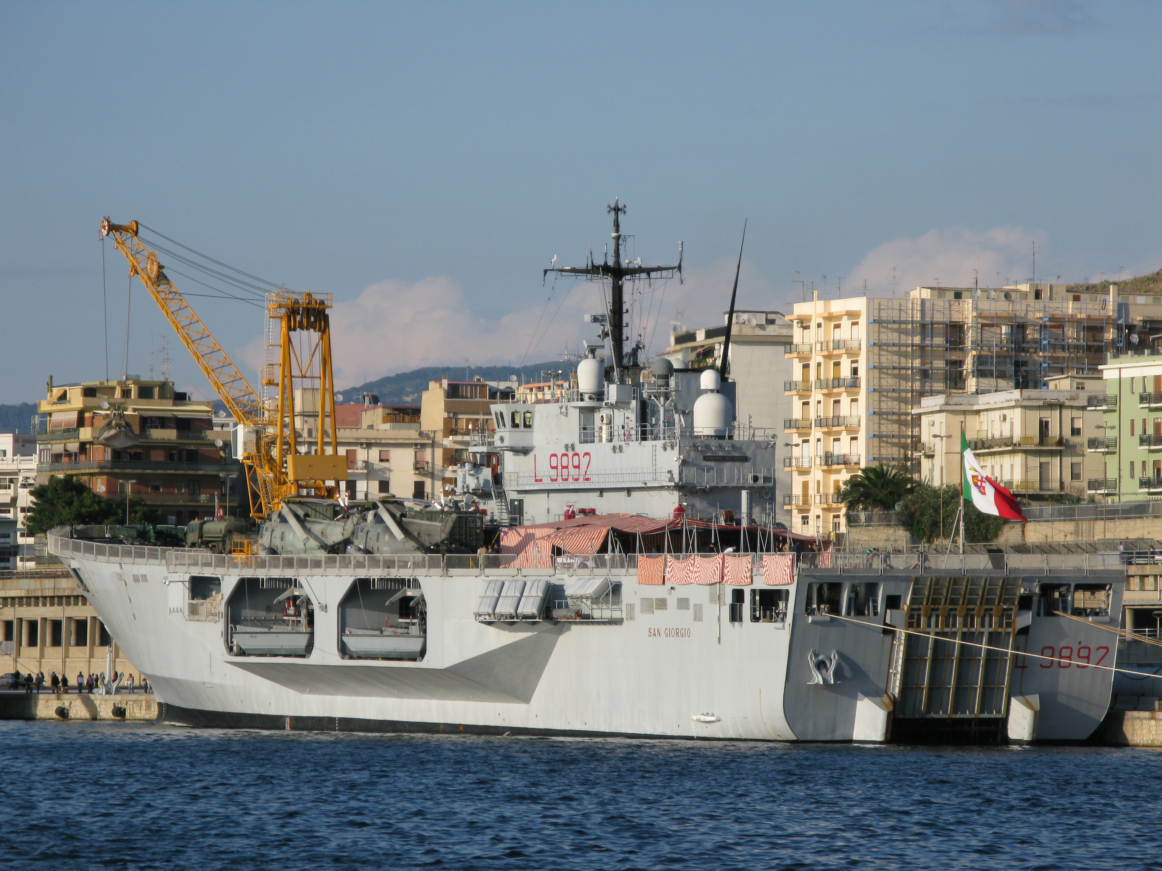 San Giorgio (L 9892)